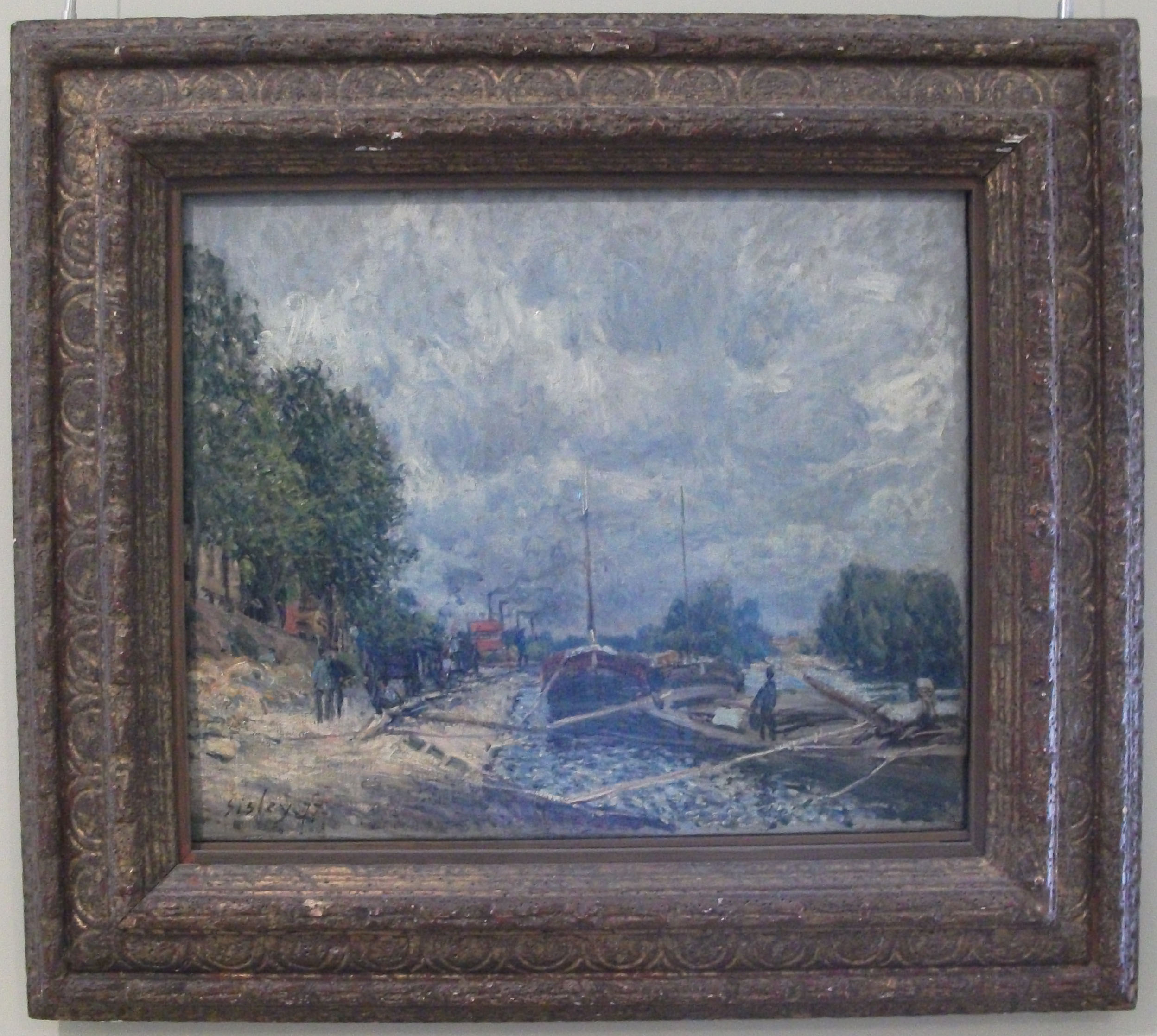 Картина Альфреда Сислея «Баржи в Бийянкуре» в раме